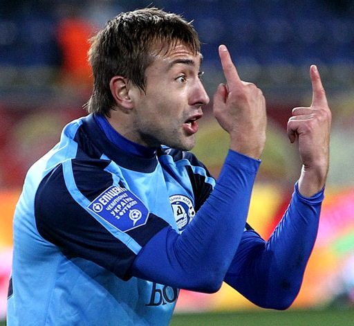 Во время матча Днепр - Арсенал